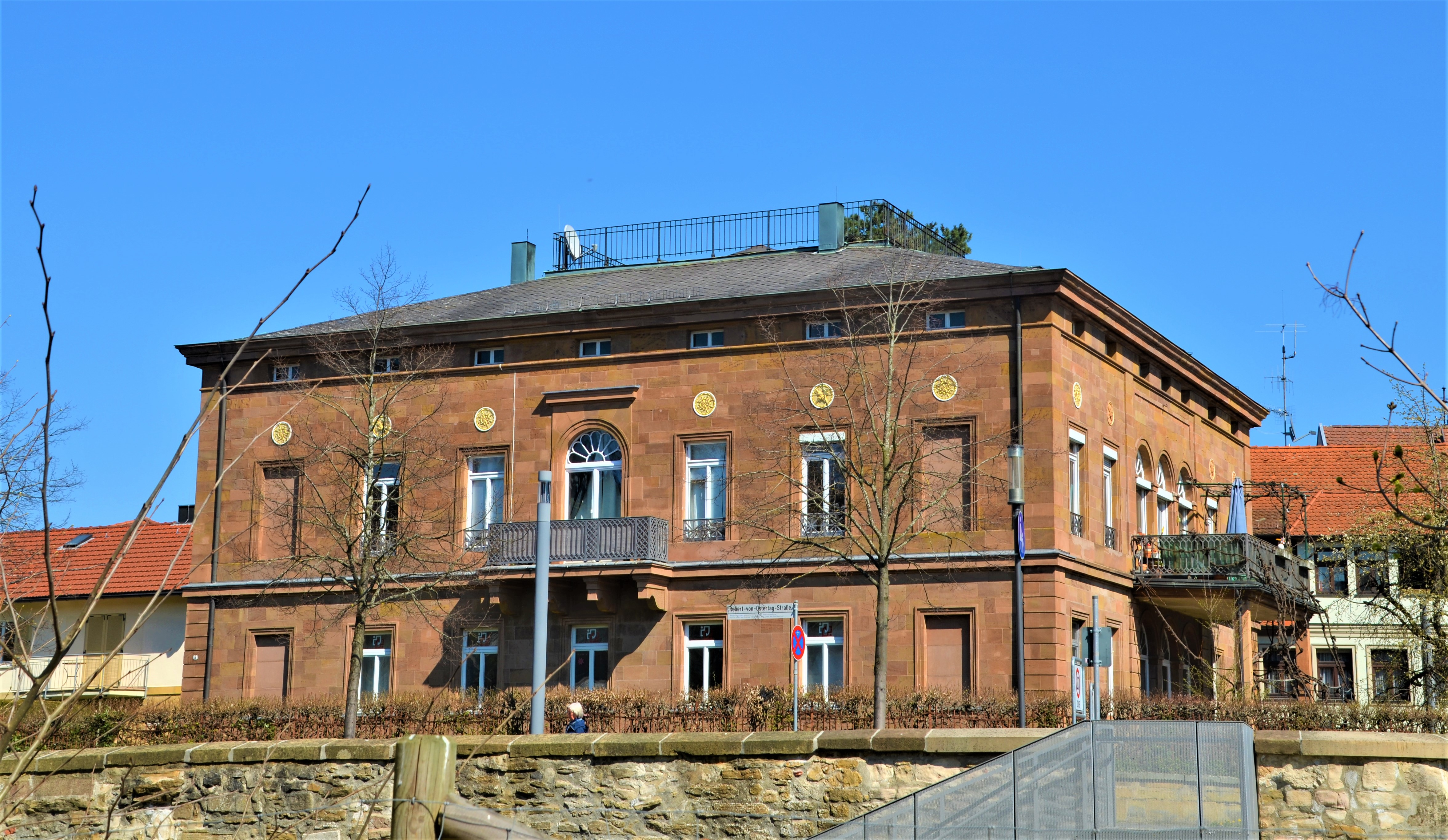 Forstersche Villa von West